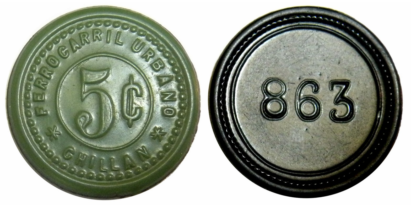 Ficha de 5 centavos utilizada en el Ferrocarril Urbano de Chillán, c.1900.